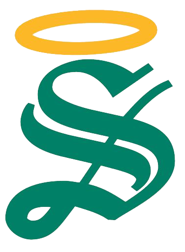 Logo del Santos Laguna